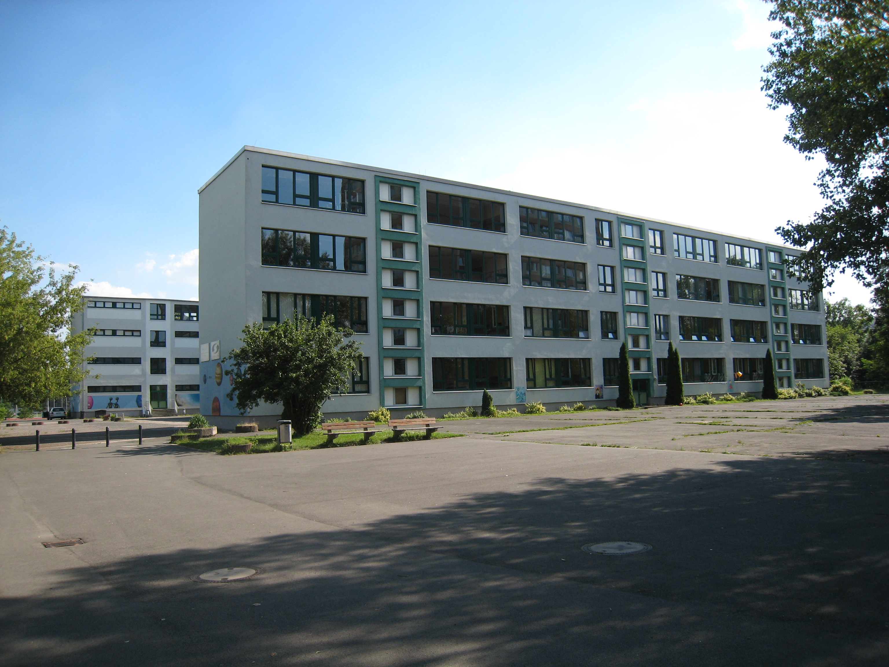 Albert-Schweitzer-Gymnasium in Erfurt